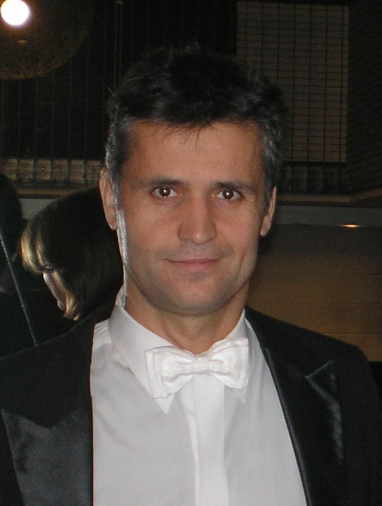 Фото сделано в Париже на концерте Димы Маликова